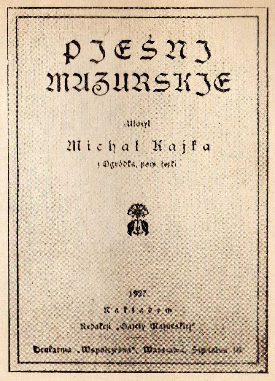 Pieśni Mazurskie autorstwa Michała Kajki - wyd. z 1927r.